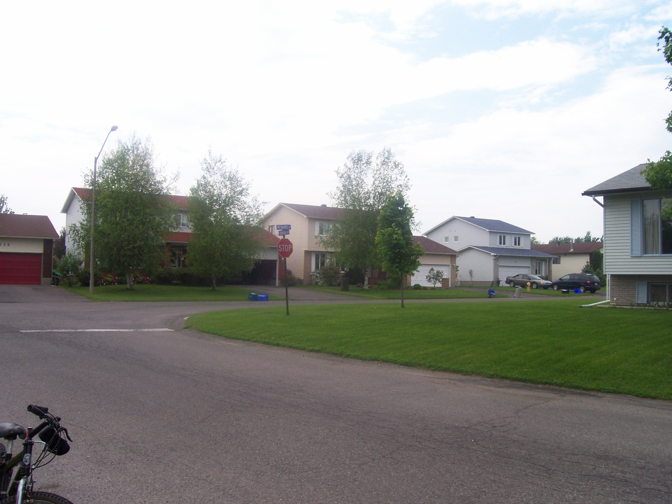 Taken in Embrun, Ontario.